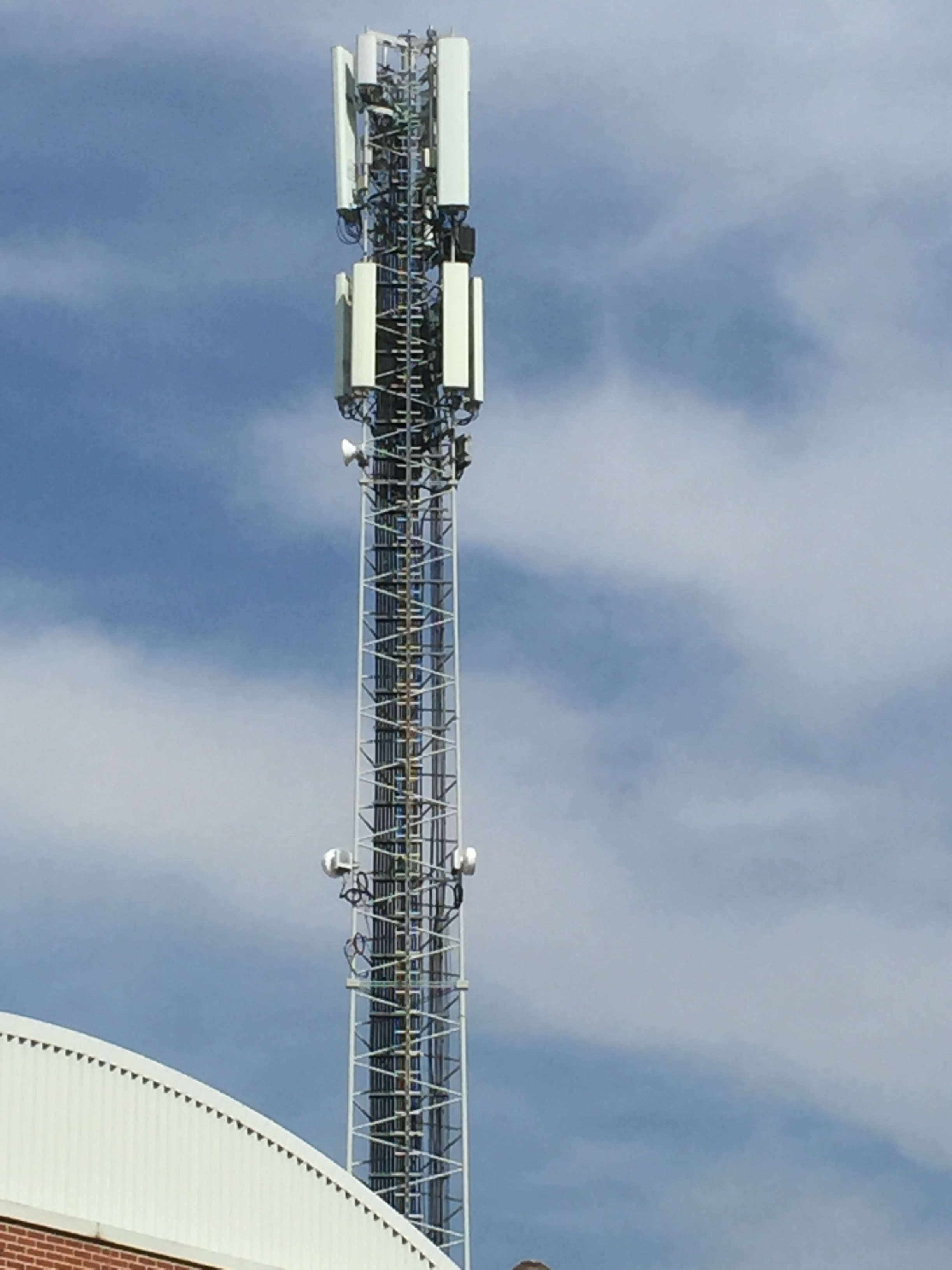 Die 5G Sender sind hochempfindliche Sensoren, die sowohl empfangen als auch senden.